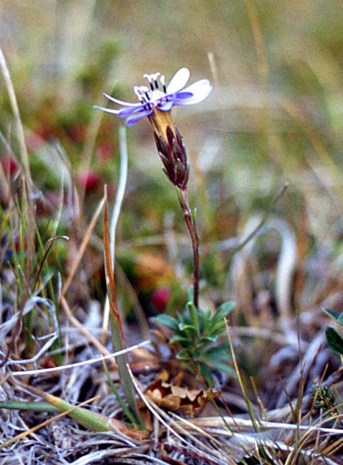 Perezia recurvata (Asteraceae) - Chile, Patagonien/Patagonia, Parque Nacional Torres del Paine, N Posada Río Serrano